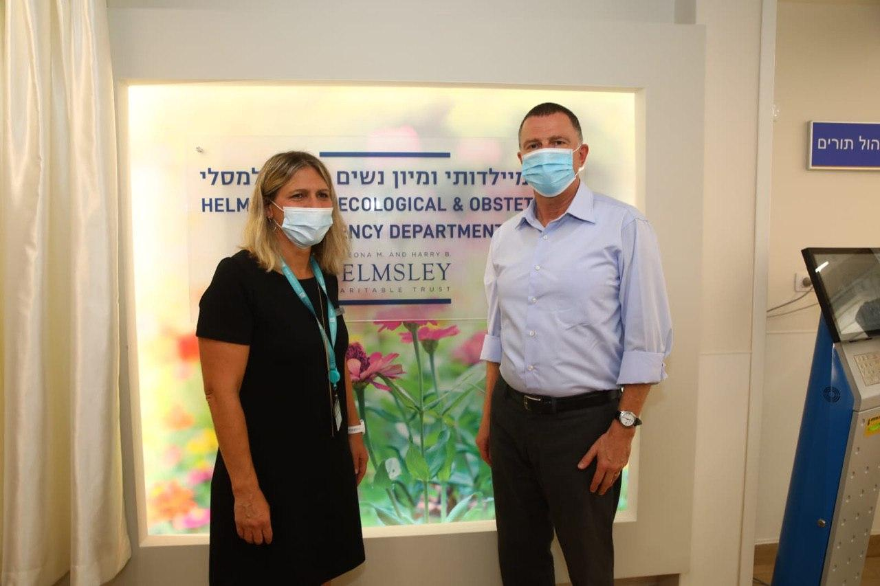 שר הבריאות יולי אדלשטיין וד"ר אסנת לבציון-קורח מנהלת המרכז הרפואי שמיר